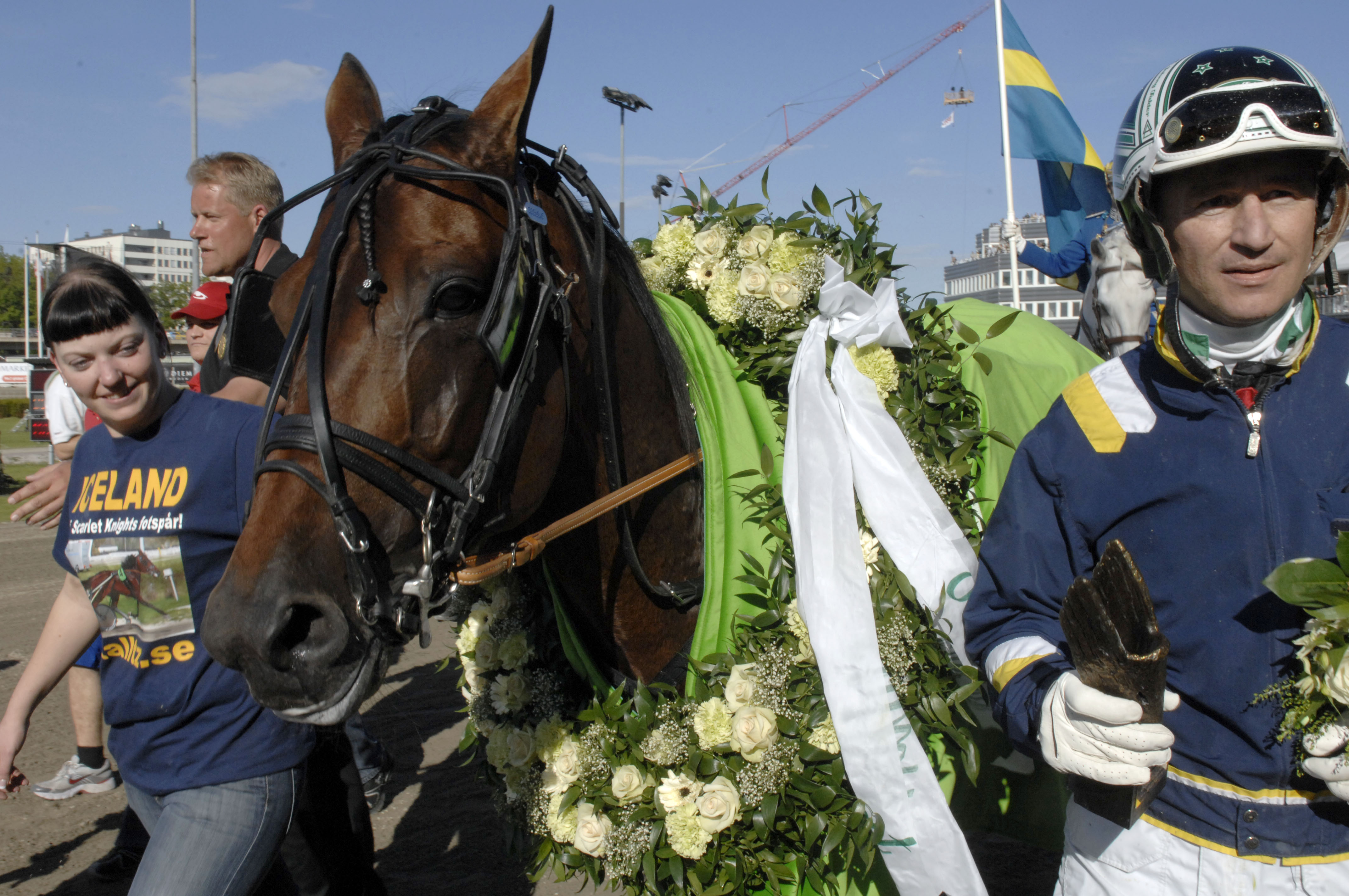 Johnny Takter segerdefilerar tillsammans med Iceland efter vinsten i Elitloppet 2010.